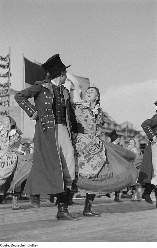 Original image description from the Deutsche Fotothek Tanzpaare einen Volkstanz aufführend